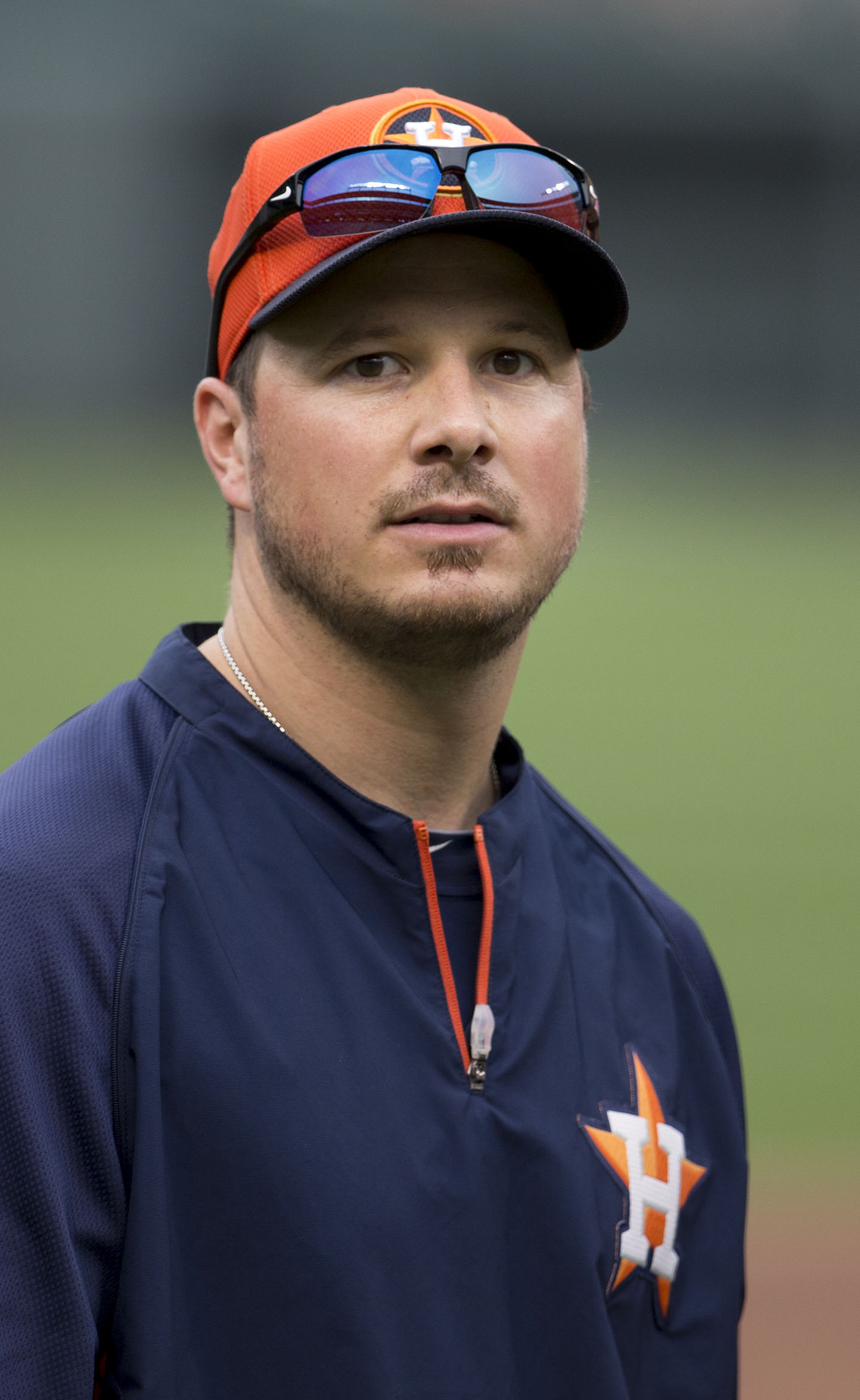 Érik Bédard